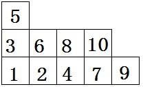 中文（中国大陆）: 一个杨表的表示